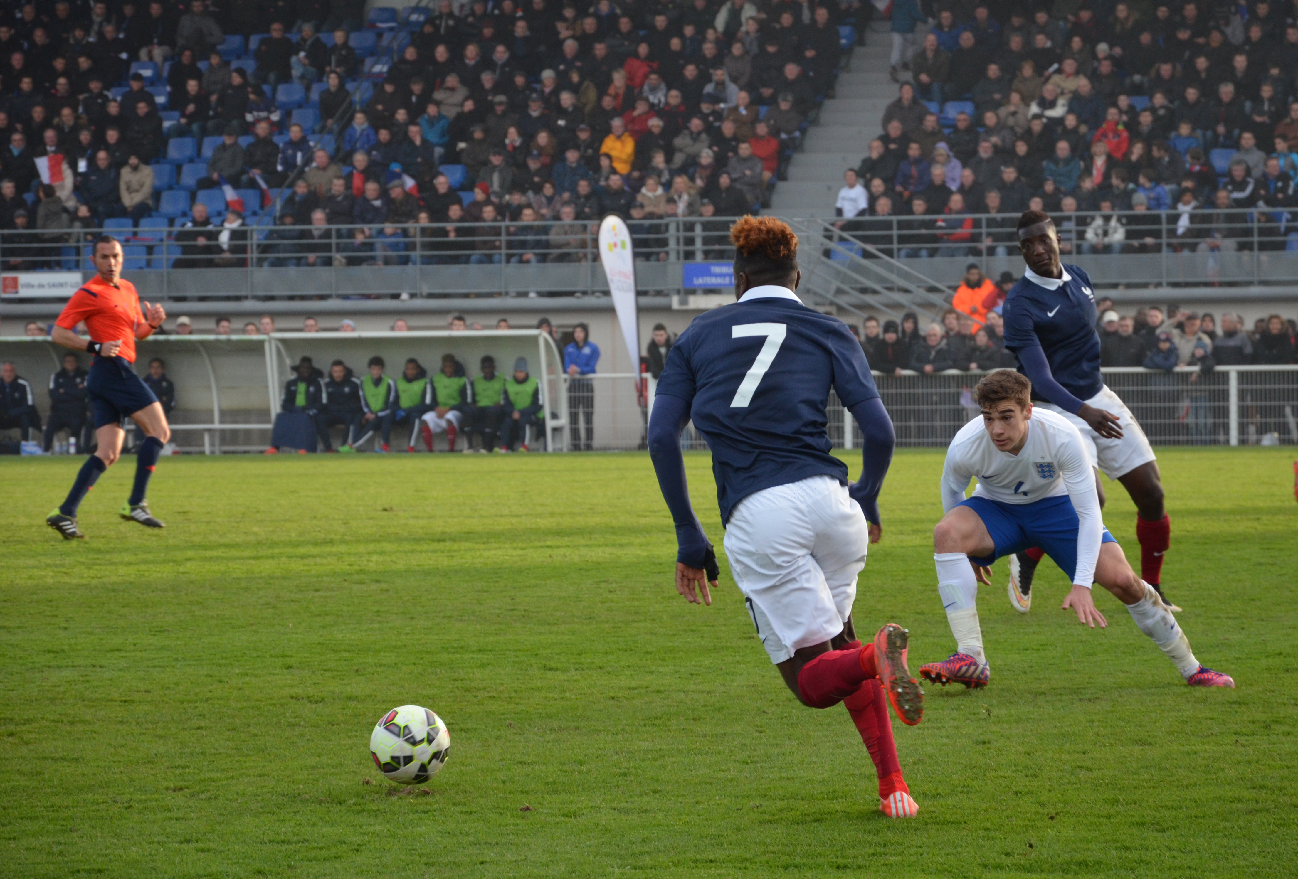 Photographie prise lors du match opposant la France à l'Angleterre pour les qualifications du championnat d'Europe de football des moins de 19 ans 2015 au stade Louis-Villemer de Saint-Lô le 31 mars 2015. Ici, course de Maxwell Cornet devant Harry Winks et Sehrou Guirassy.